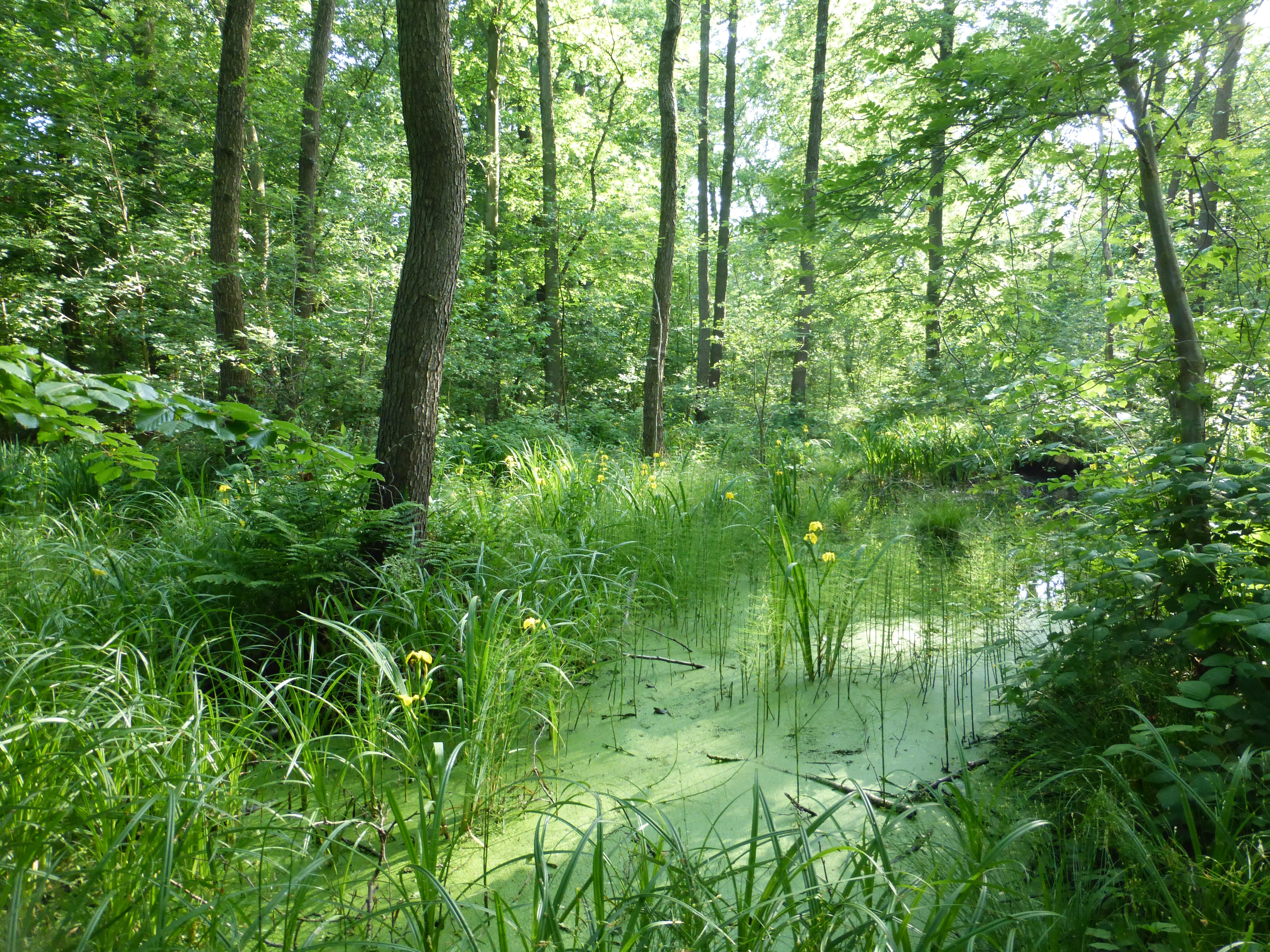 Sumpf im Wald; FFH-Gebiet DE-4546-304 „Röderaue und Teiche unterhalb Großenhain“ in Röderaue (OT Frauenhain)